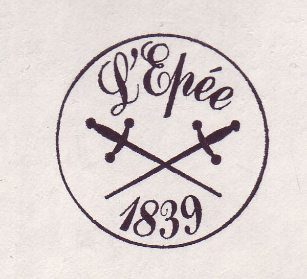 Logo de l'horloger l'Epée